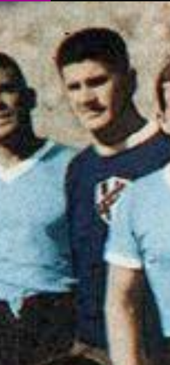 Juan López Fontana